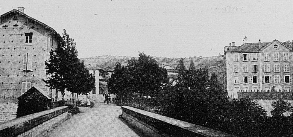 Dictionnaire illustré des communes du département du Rhône. Tome 1 / par MM. E. de Rolland et D. Clouzet.